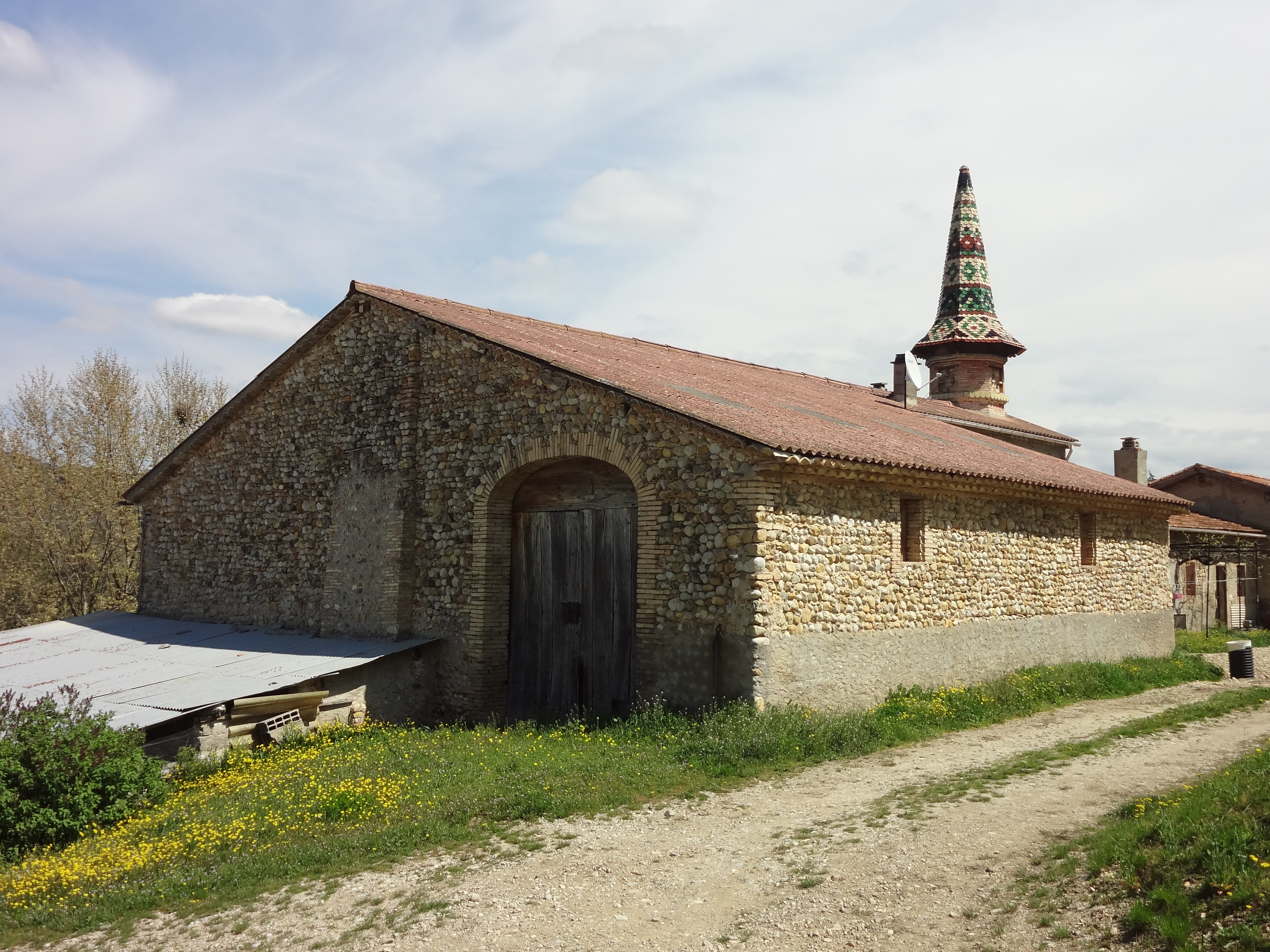 chapelle non-identifiée à Saint-Julien-d'Asse (rive gauche), clocheton en tuiles vernissées, lieu-dit Chapelle